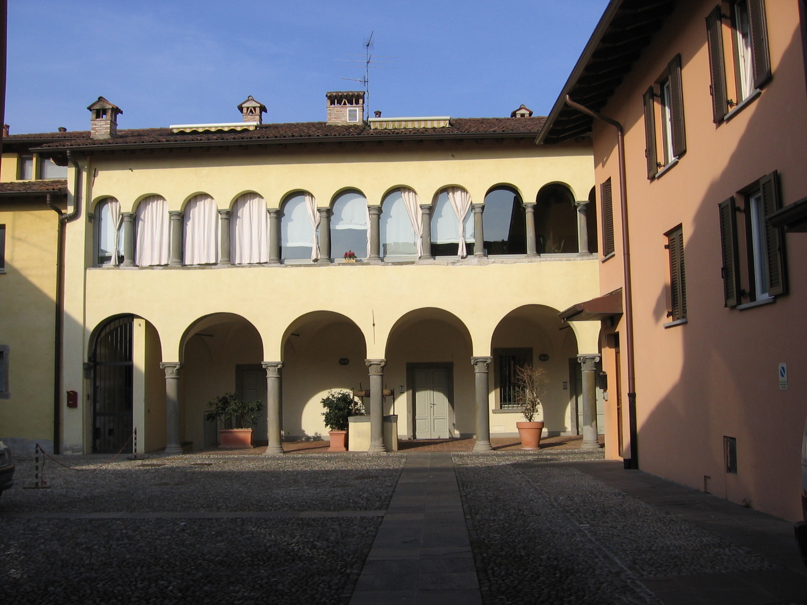 Ranica, Bergamo, Italia